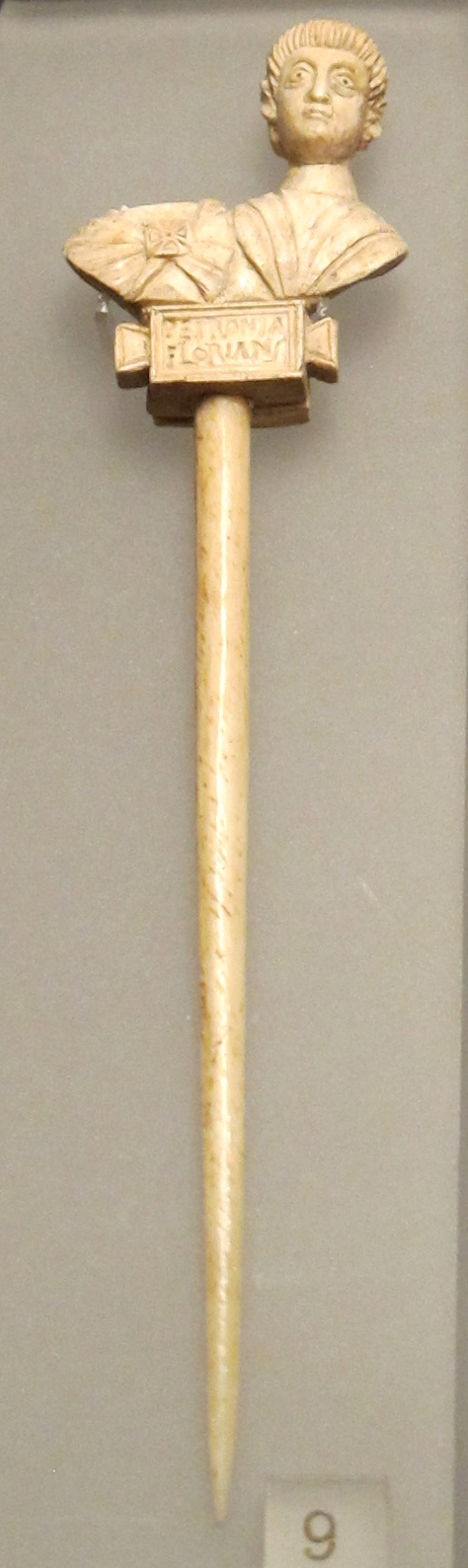 Ago crinale in osso con coppia di busti, iscriz. Petronia Florian.s, 350-400 ca. Palazzo Massimo alle Terme (Roma)